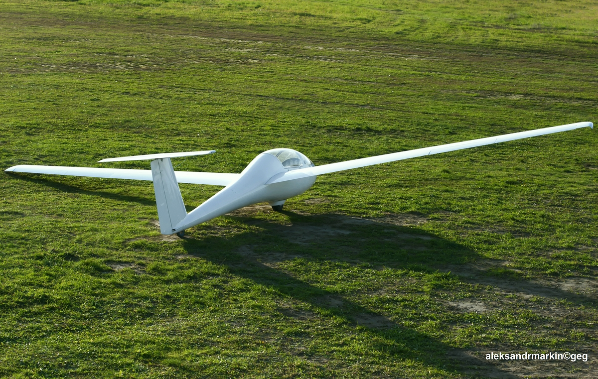 Russian glider AC-4 "Russian"